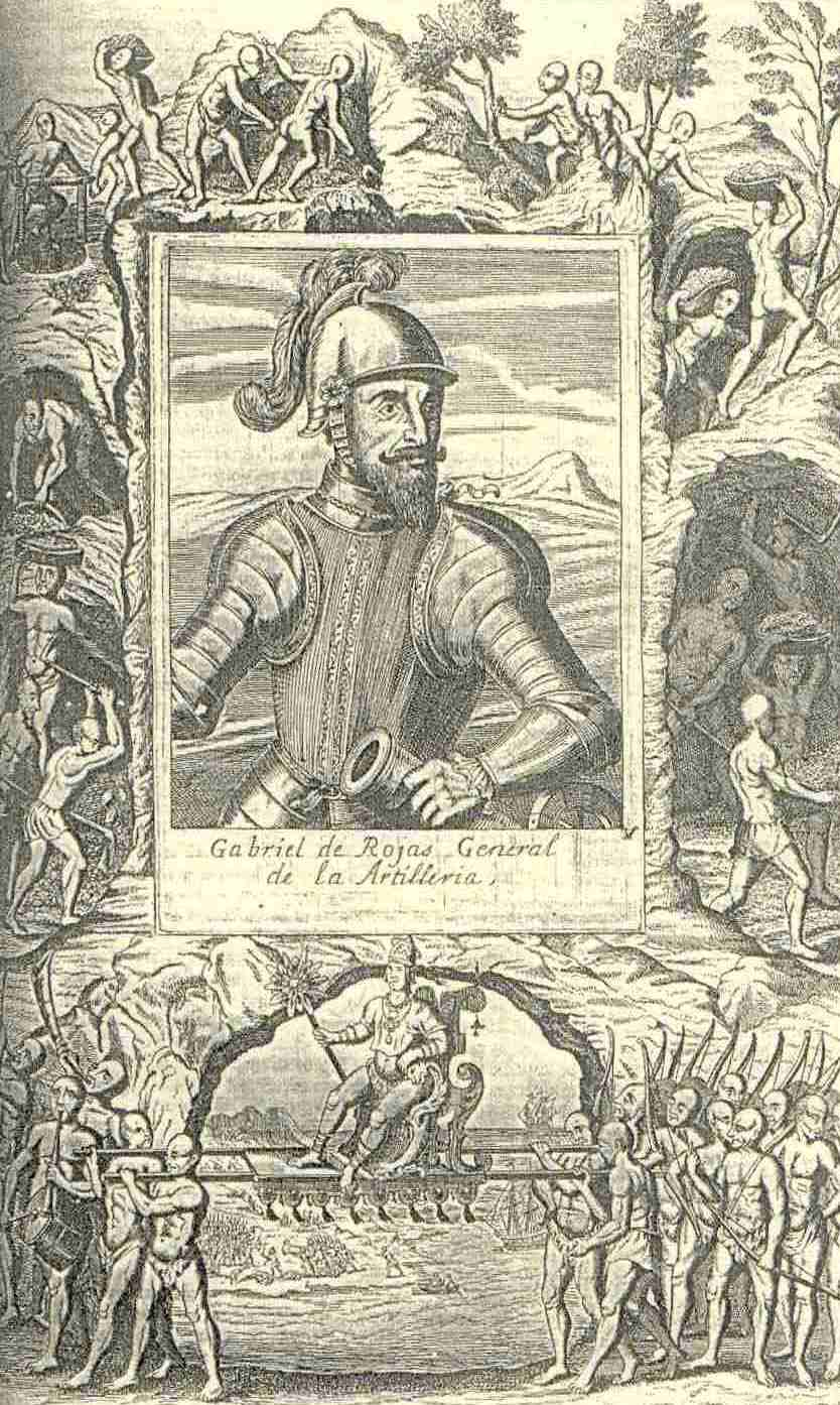 Retrato de Gabriel de Rojas, natural de Cuéllar, entre escenas de las actividades en Perú.